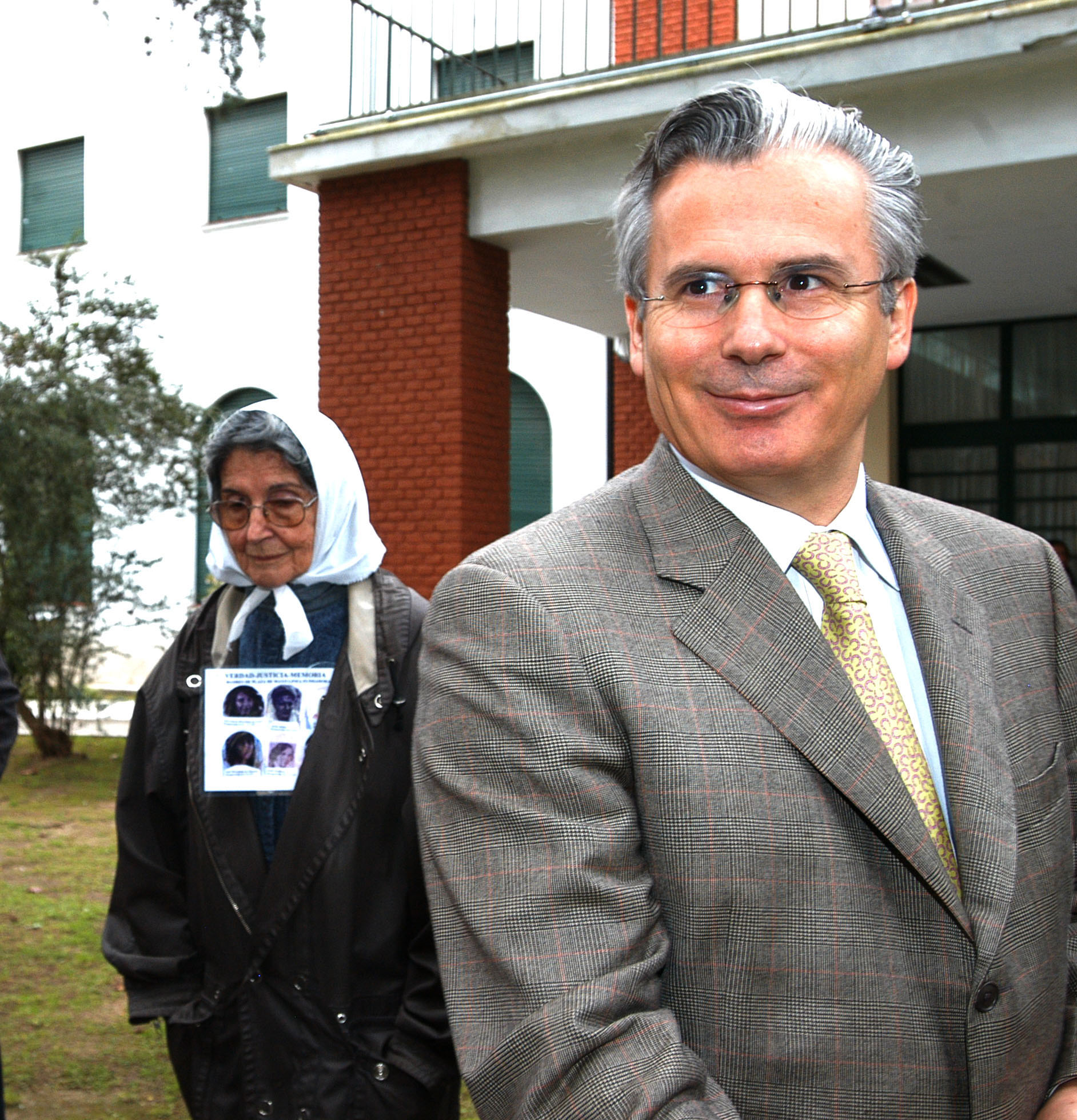 Baltazar Garzón visita Centro Clandestino de Detención ESMA. Buenos Aires. Argentina. 1 de agosto de 2005. foto oficial